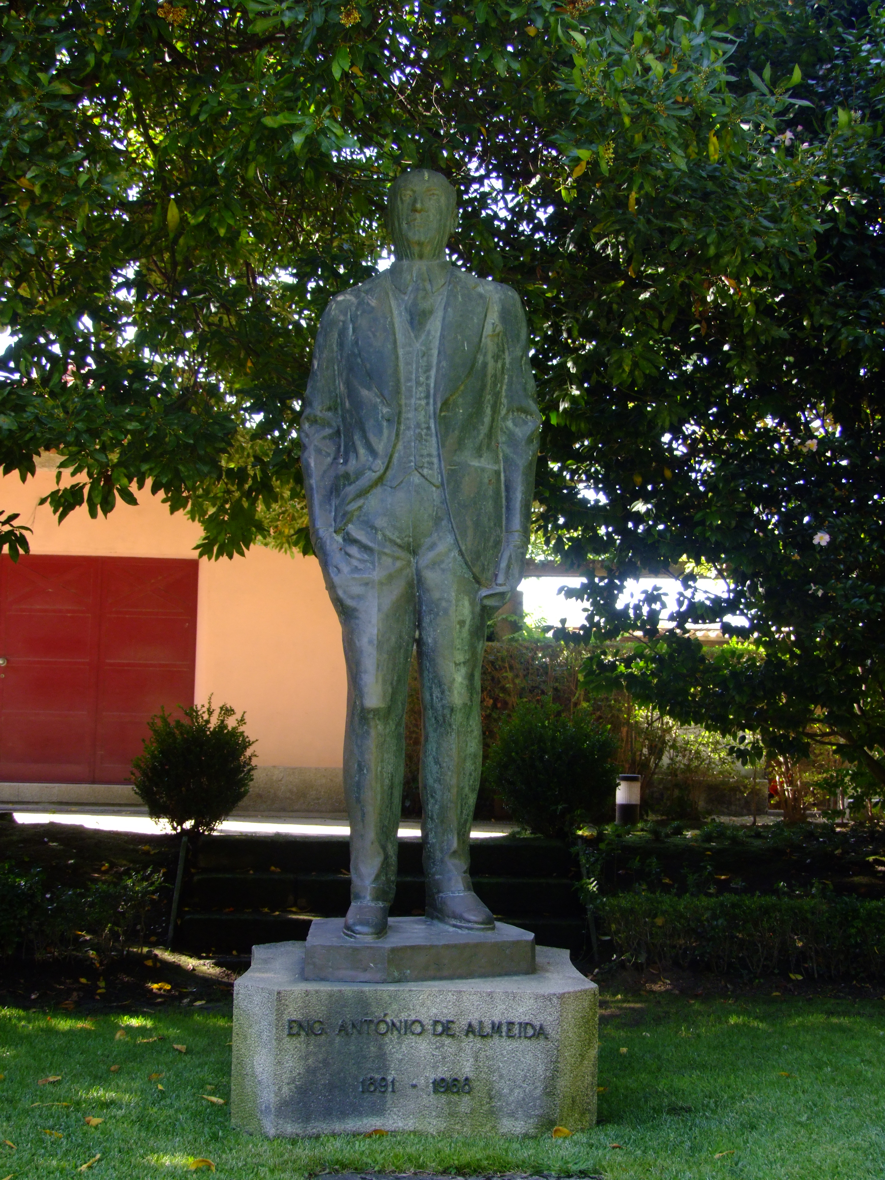 Eng.º António de Almeida, estátua em Ramalde, Jardim da Fundação Eng.º António de Almeida, Rua do Tenente Valadim. De 1979, autor Barata Feyo.